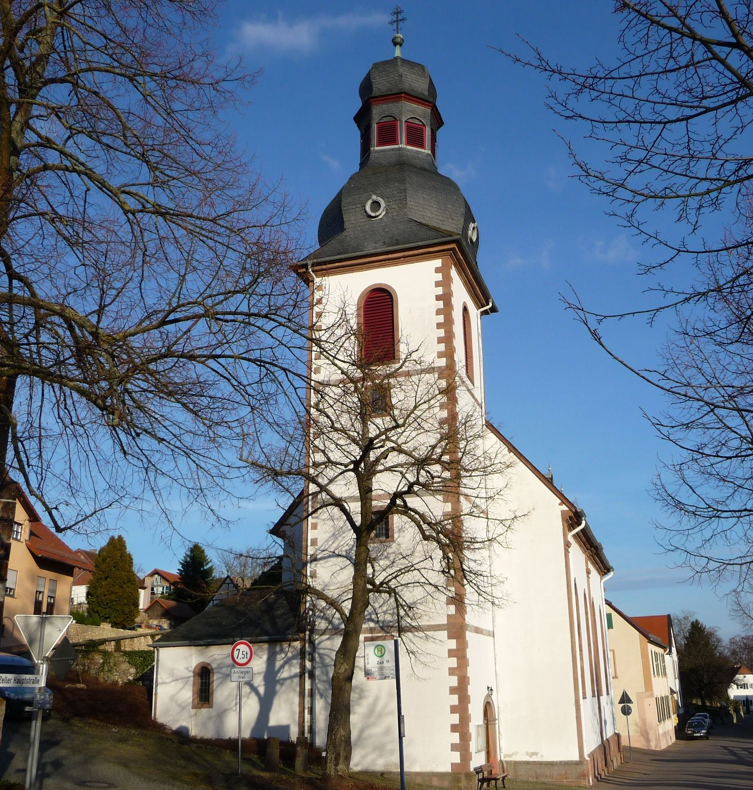 St.-Philipp-Kirche, Zell, Zellertal